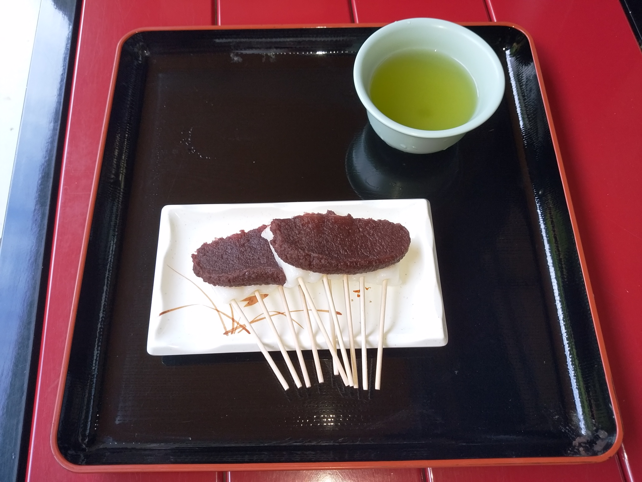 法多山尊永寺の名物「厄除だんご」